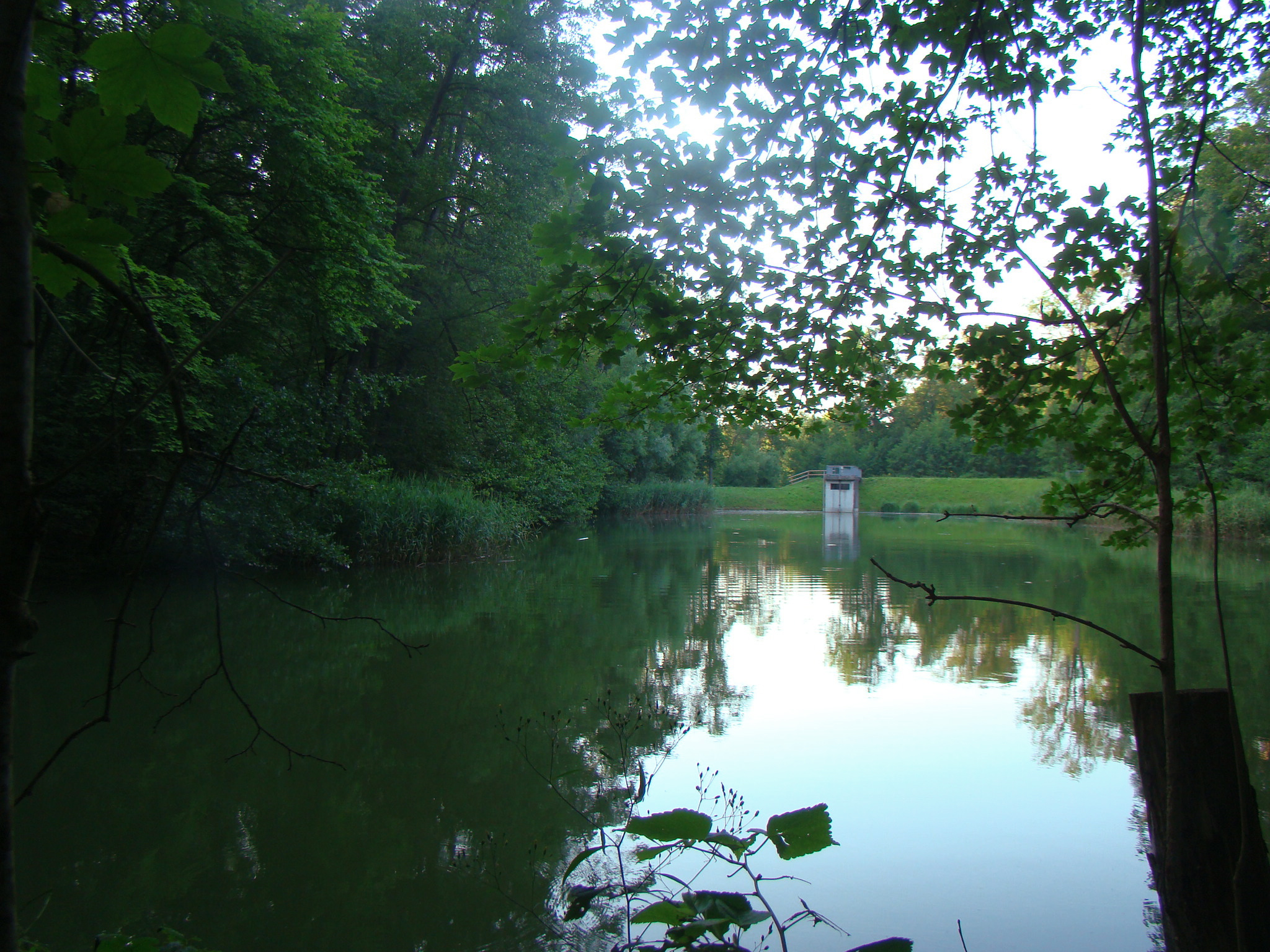 Köpfertal in Heilbronn